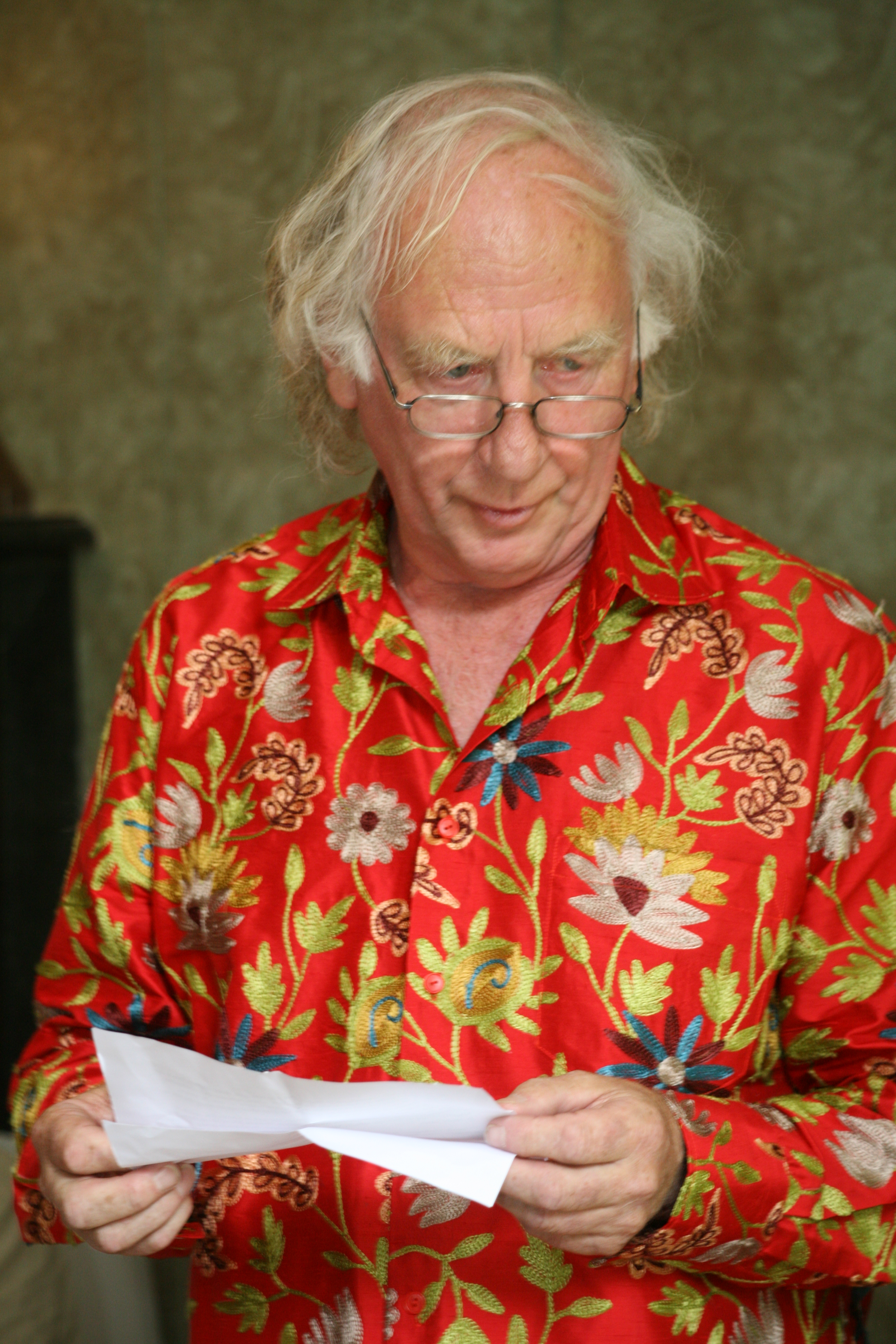 Carel Muller draagt voor bij de bruiloft van zijn zoon Engel en schoondochter Leonie